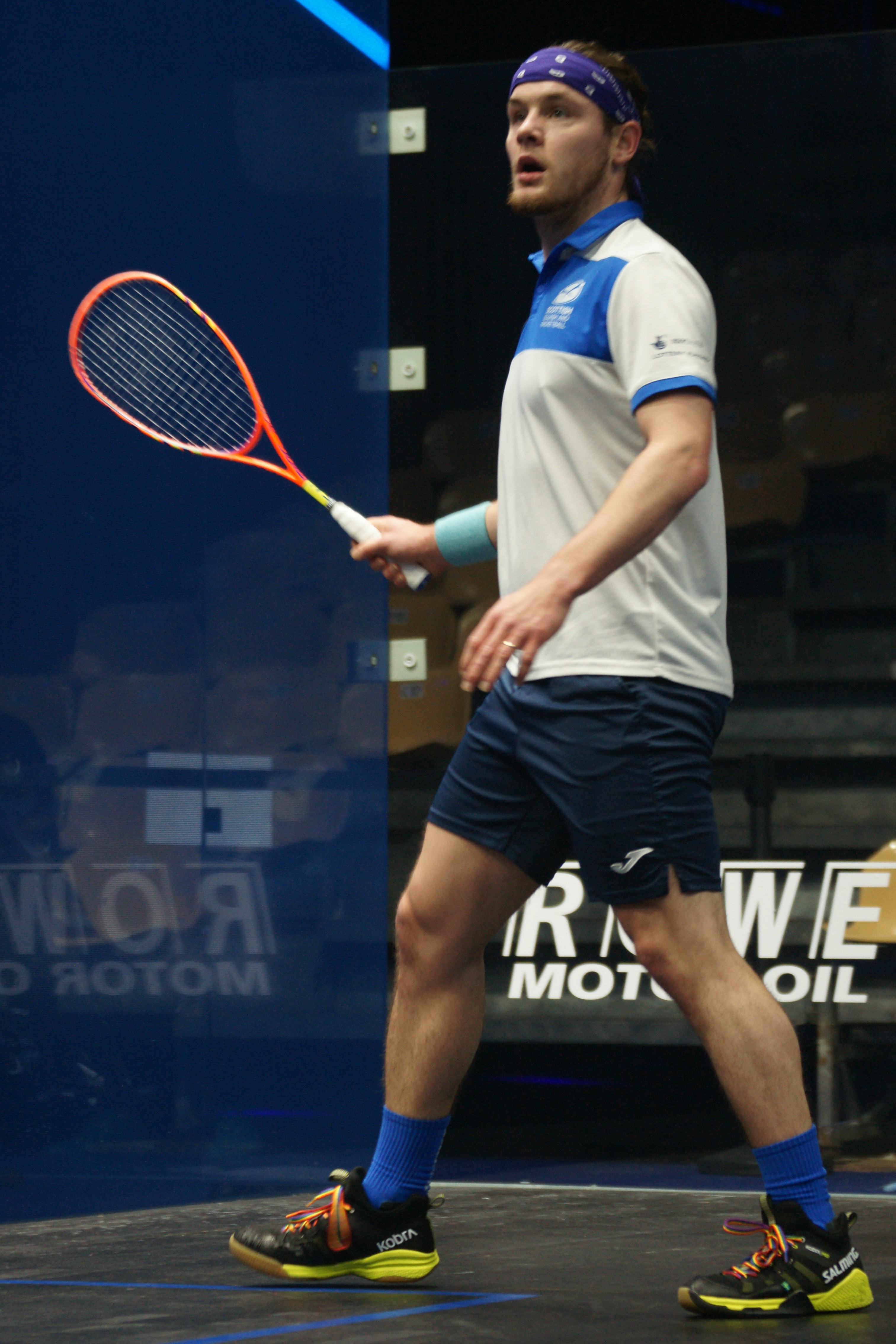 championnats du monde de squash par équipe Marseille 2017